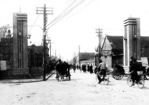 吉林城北新开门